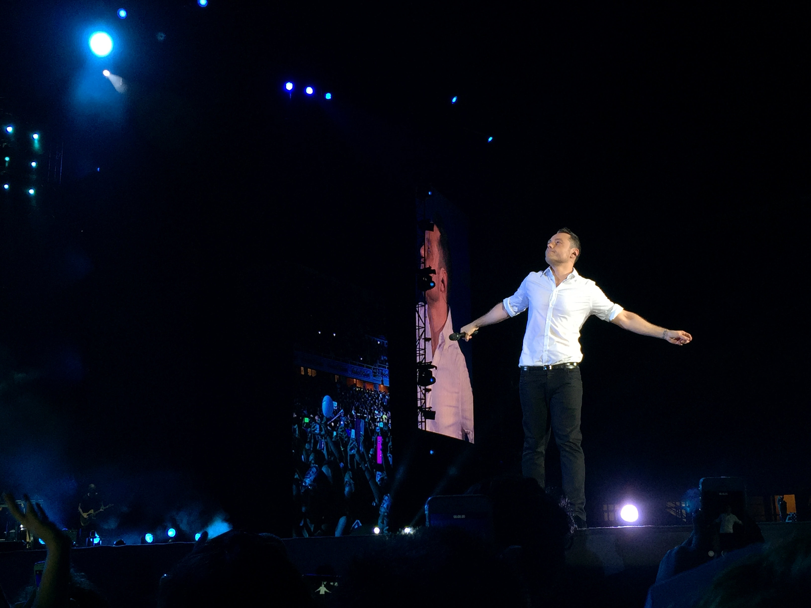 Lo stadio Tour 2015 di Tiziano Ferro, 23 giugno 2015, Stadio Artemio Franchi, Firenze